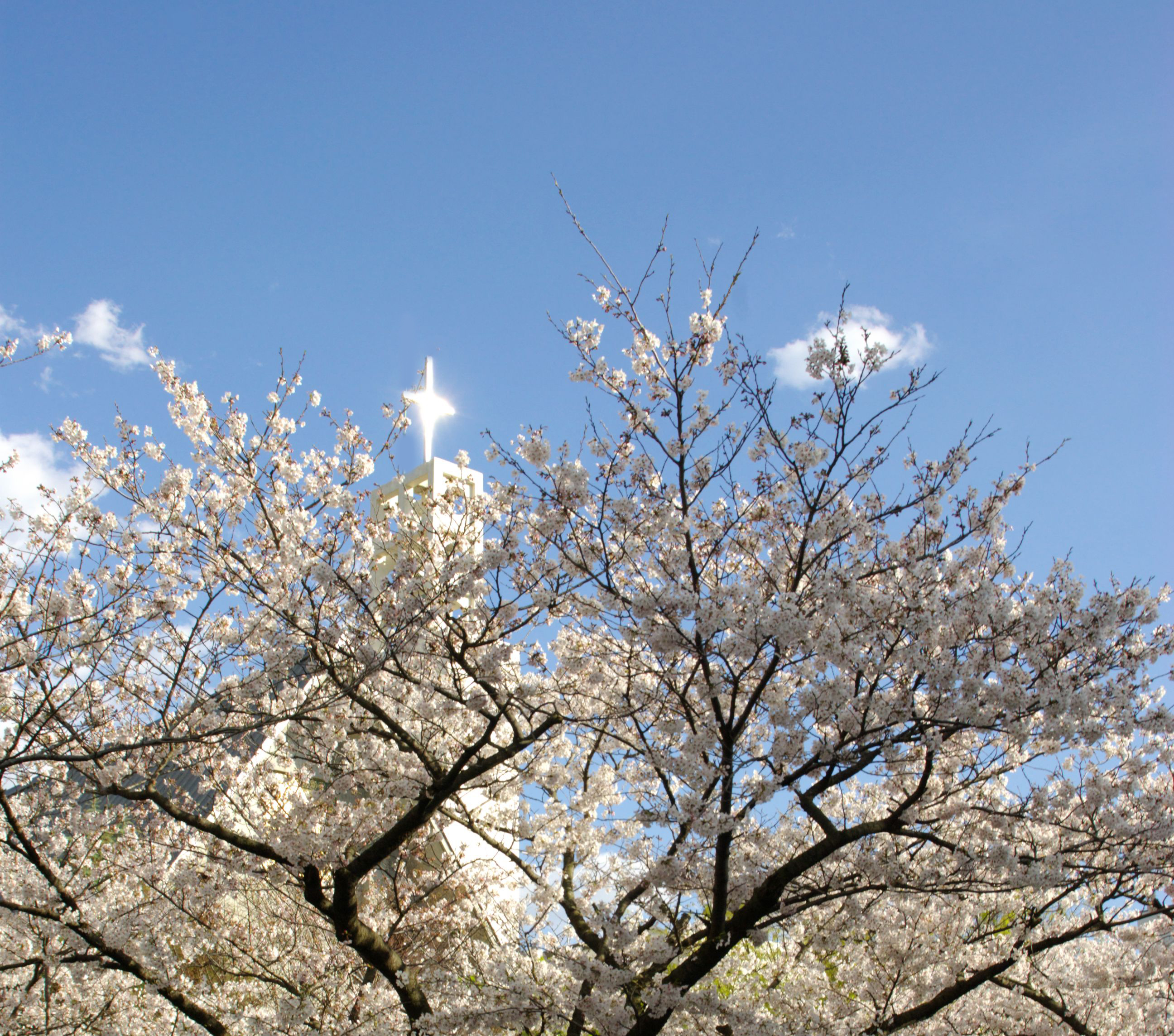 A Church in Kamakura, Japan